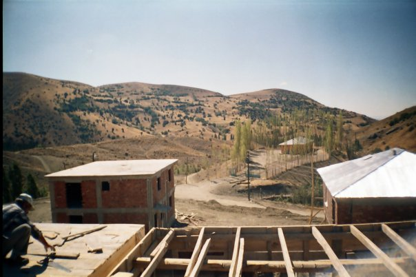 Köylülerin , ev yaparken resimleri